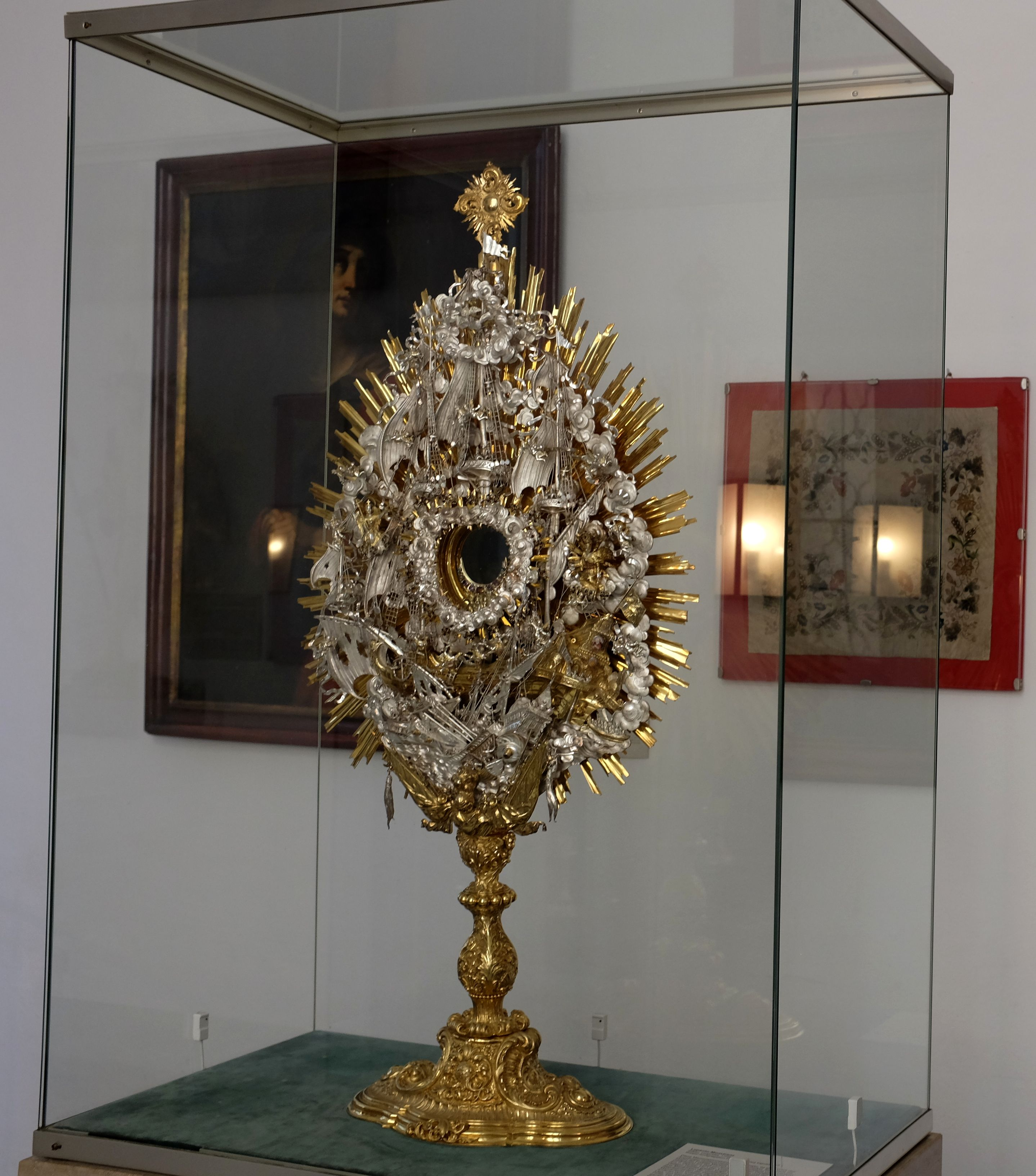 Lepantomonstranz